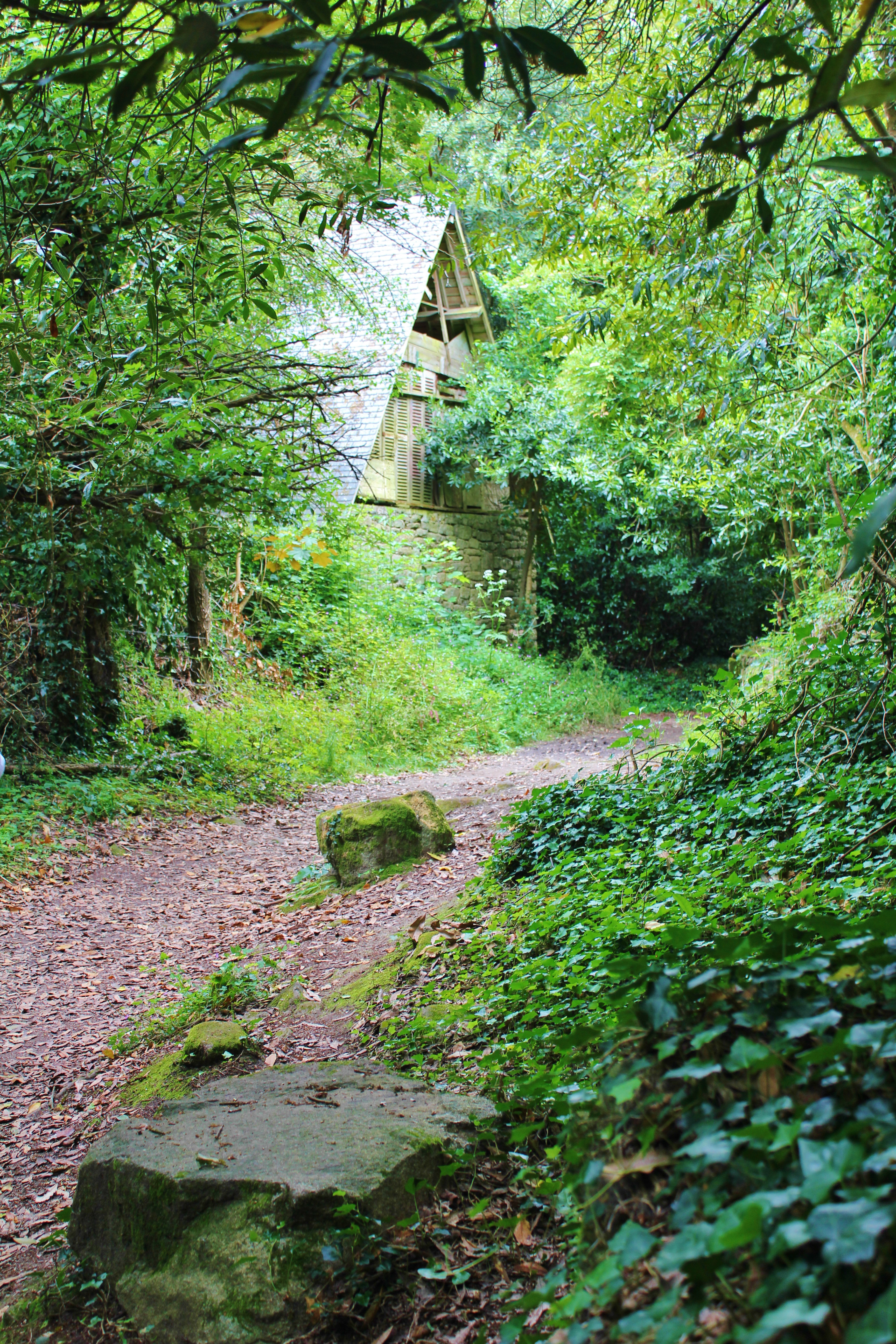 chemin de cadoudal - locoal mendon